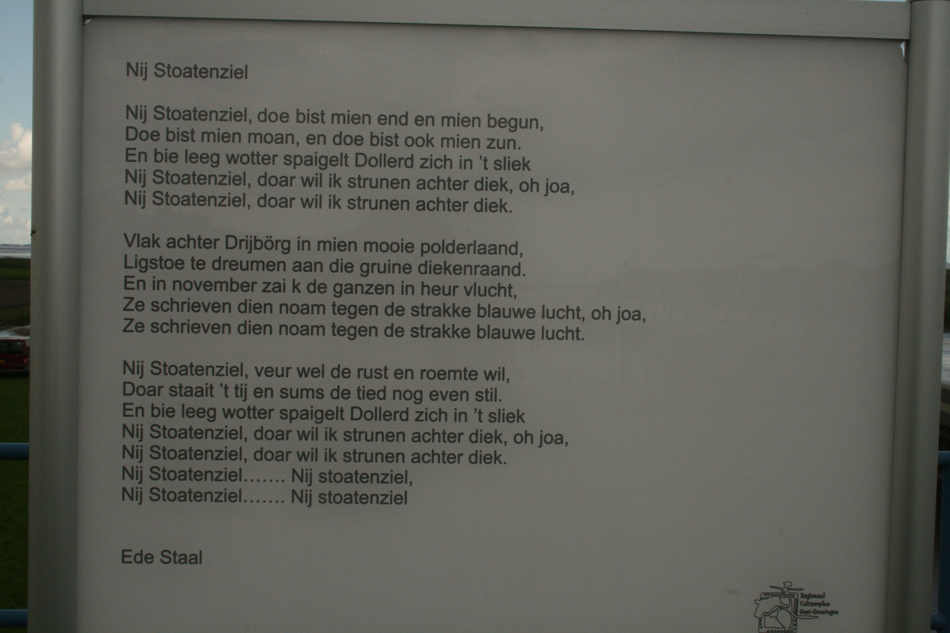 Nieuwe Statenzijl 12 plaquette met tekst Ede Staal (2010)